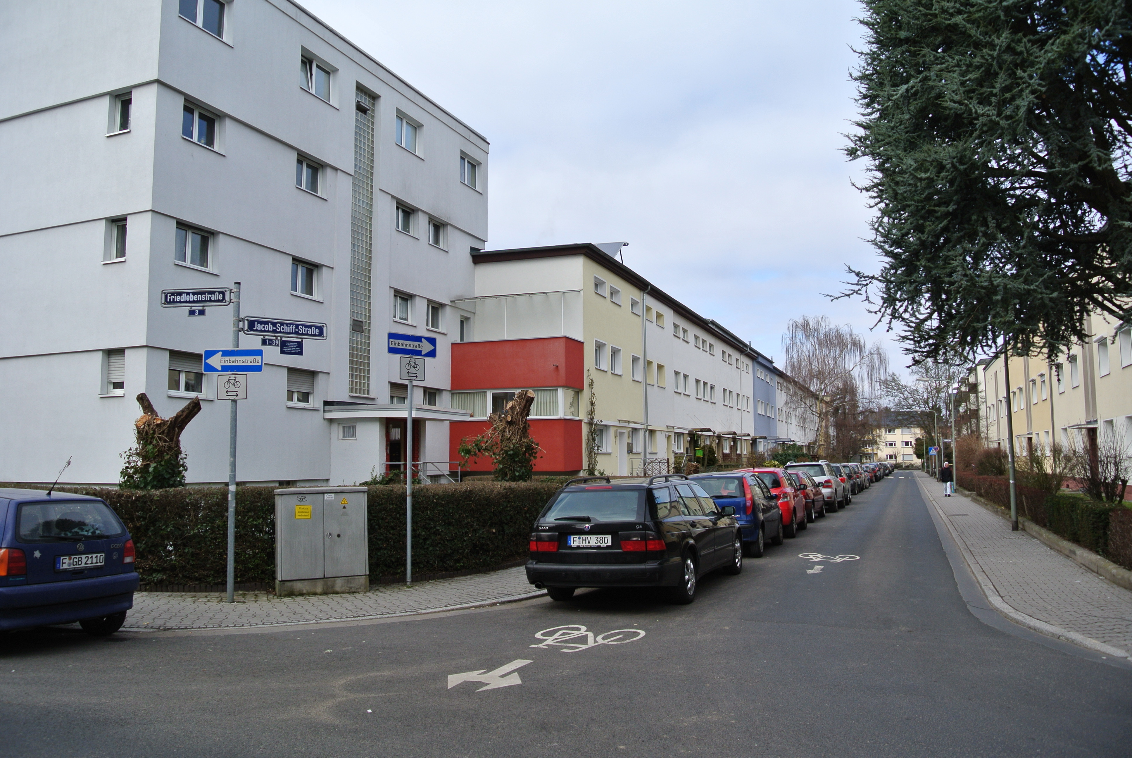 Blick nach Norden von der Friedlebenstraße in die Jacob-Schiff-Straße